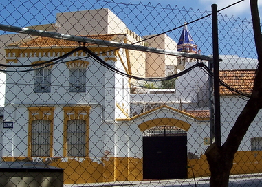 El Coronil (Sevilla, España). Casa del Peón Caminero. Al fondo, lienzo almenado del Castillo de El Coronil y campanario de la Iglesia de Ntra. Sra. de Consolación.